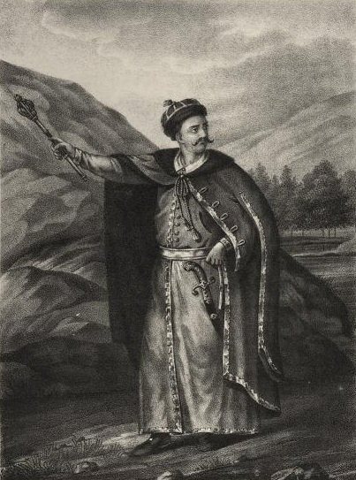 Малороссийские казаки в начале XVIII столетия, Kazachy Polkovnik.